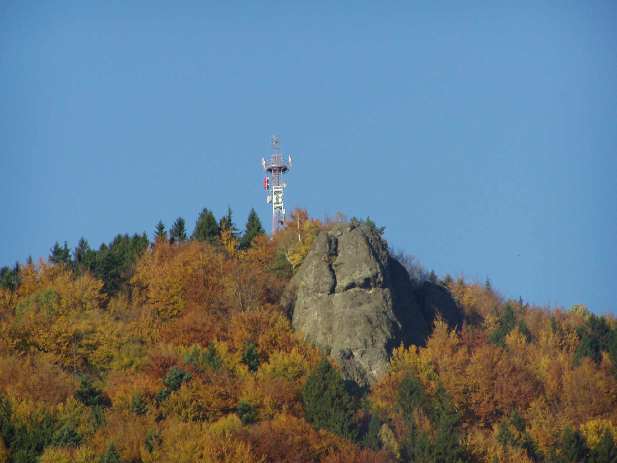 Vrchol od Rematy